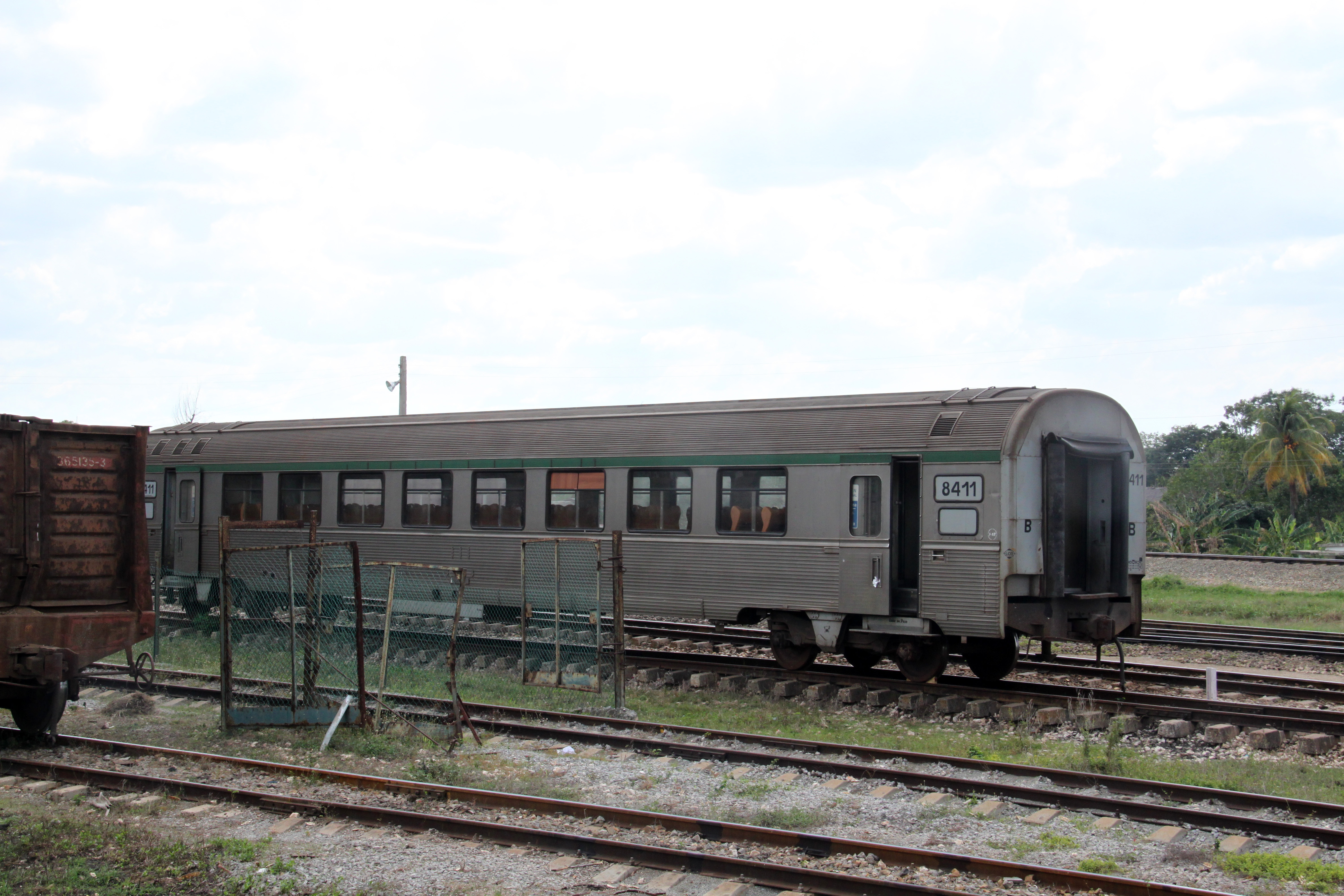 Los rijtuig van de Tren Francés, de langeafstandstrein van Cuba samengesteld uit voormalige rijtuigen van de TEE L'Étoile du Nord op een van de emplacementen van Las Tunas.